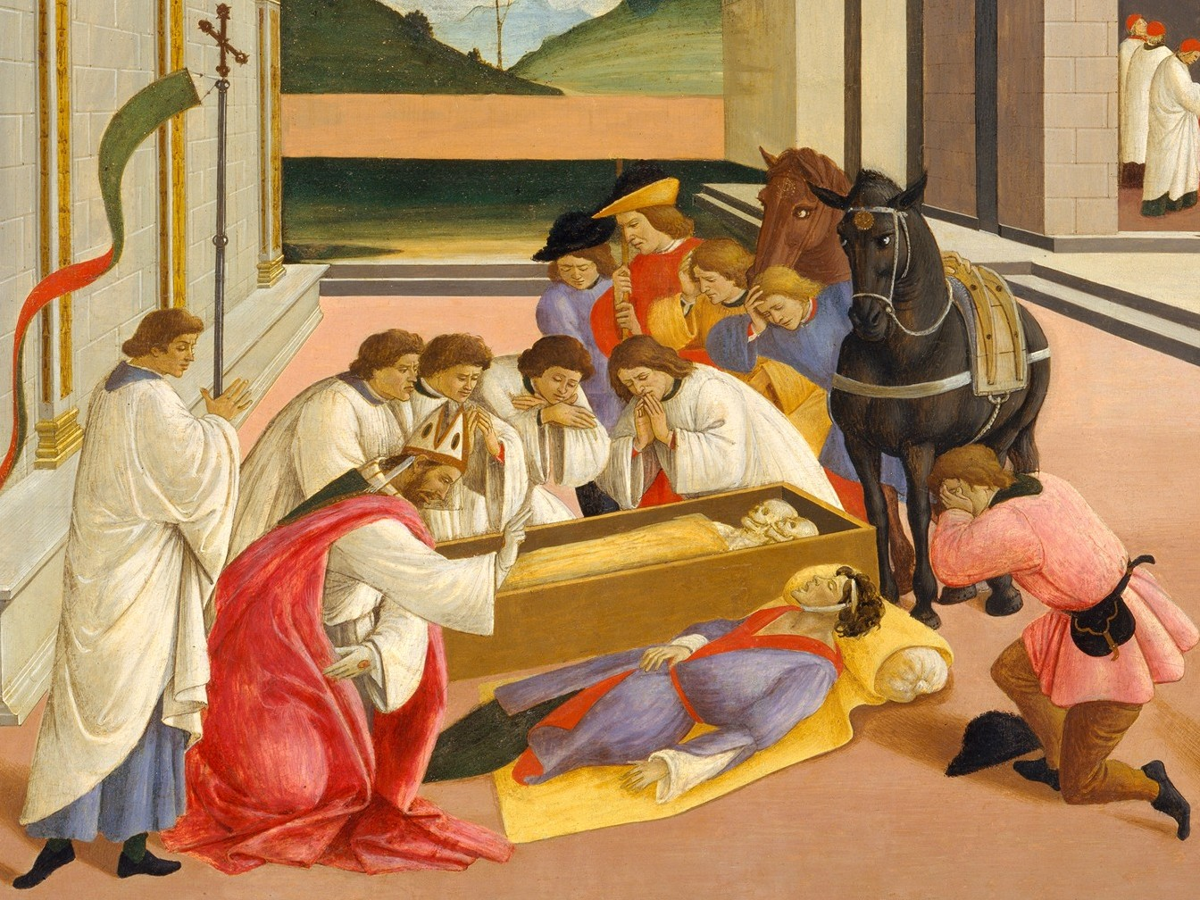 Painting; Paintings